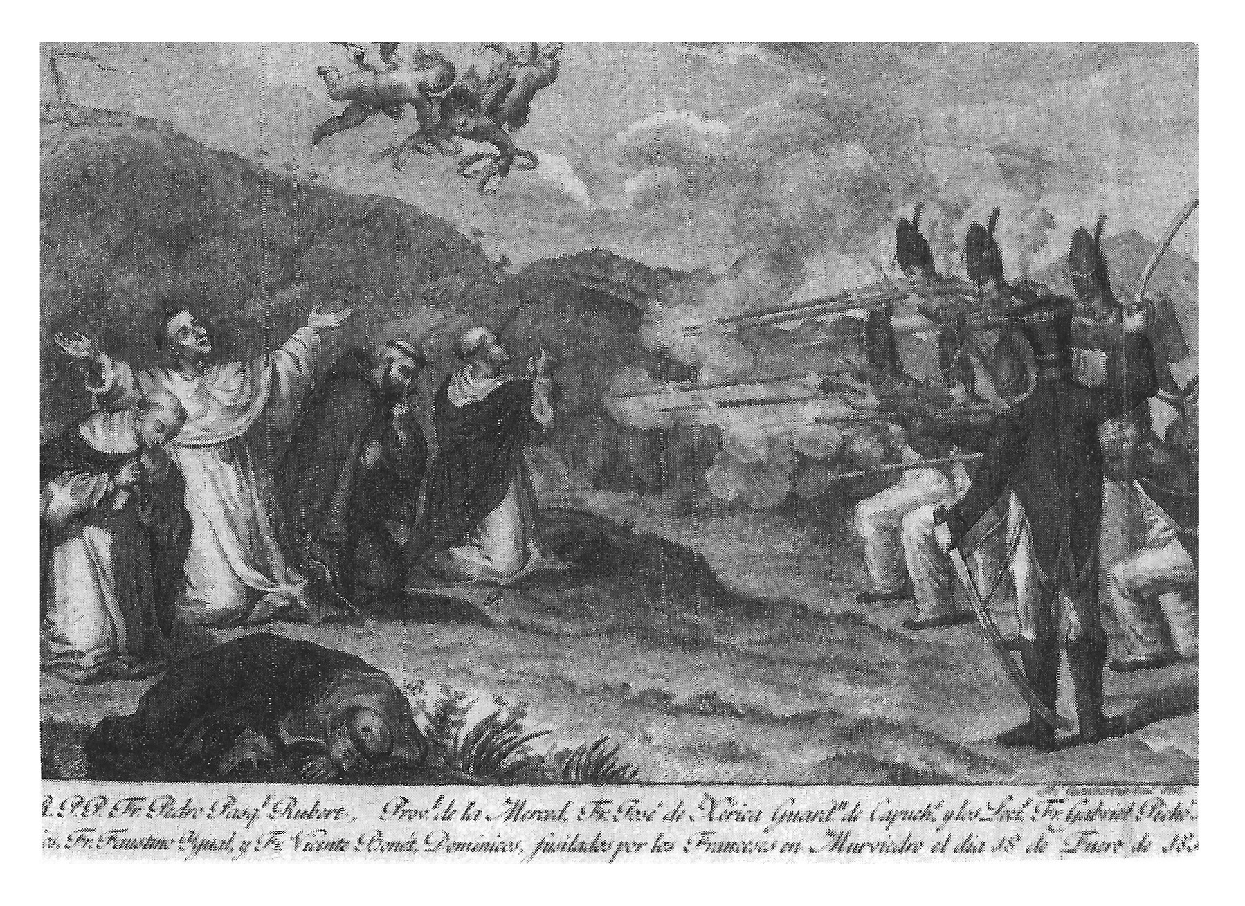 Uns franciscans són afusellats pels francesos a Morvedre, el 18 de gener de 1812